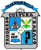 Escudo del municipio Tlalnepantla de Baz.